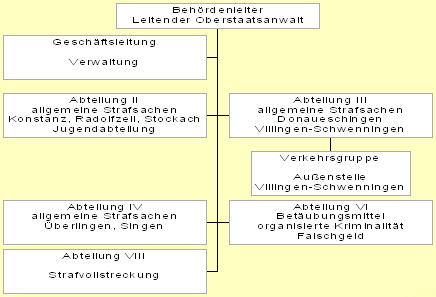 Grafische Darstellung der Organisationsstruktur der Staatsanwaltschaft Konstanz (Abteilungsstruktur); 2006.